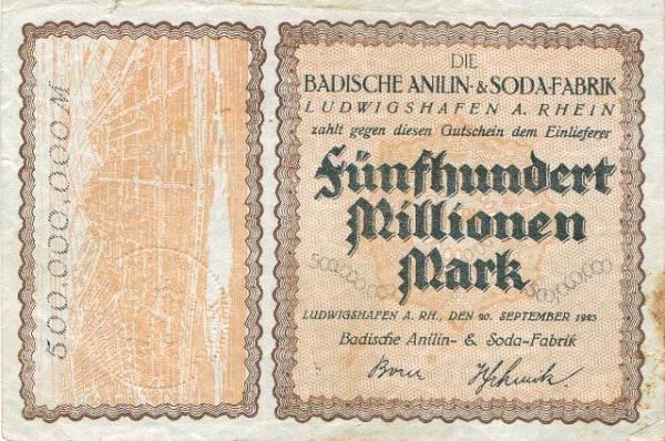 Notgeldschein 500 Mio Mark, 1923